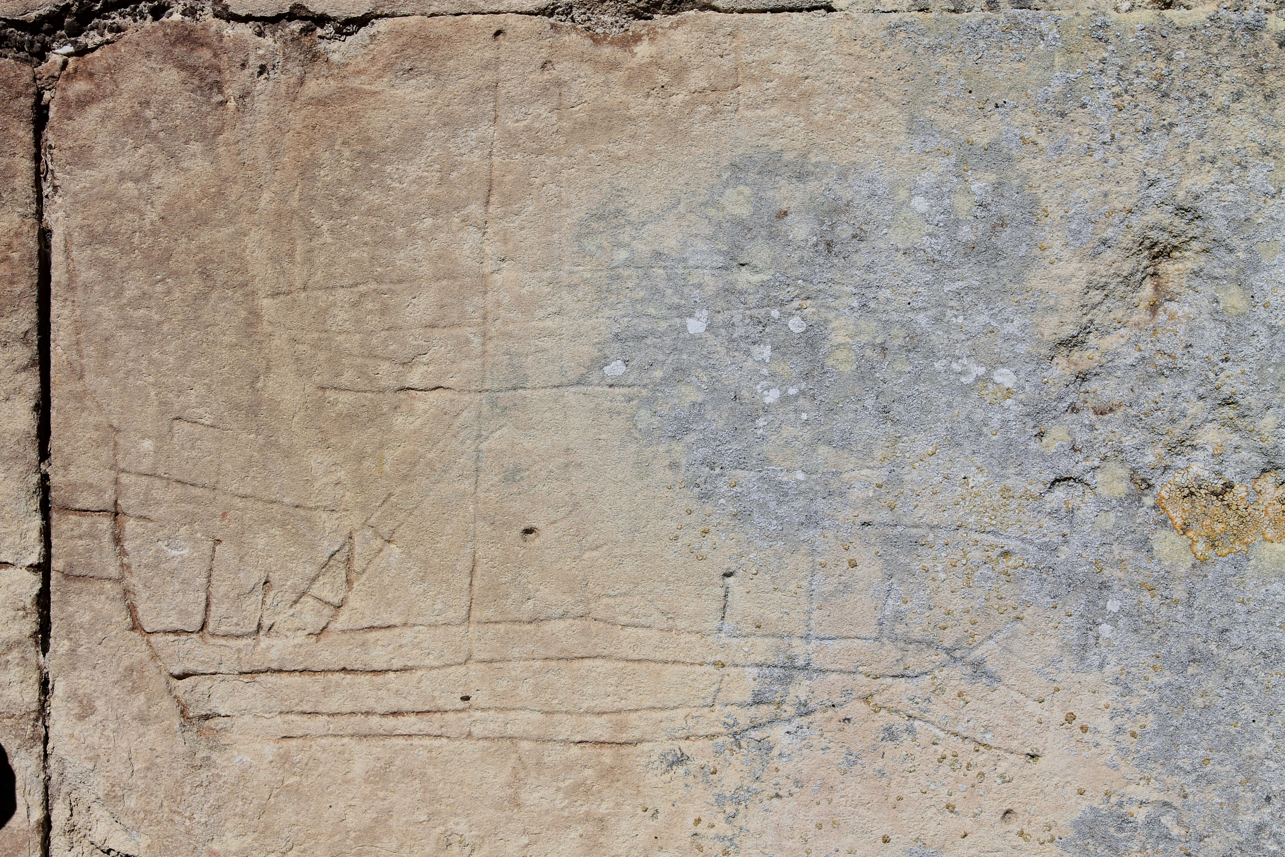 Graffiti de bateau sur le mur de la sacristie de l'église Saint-Martin de Colombelles (Calvados)